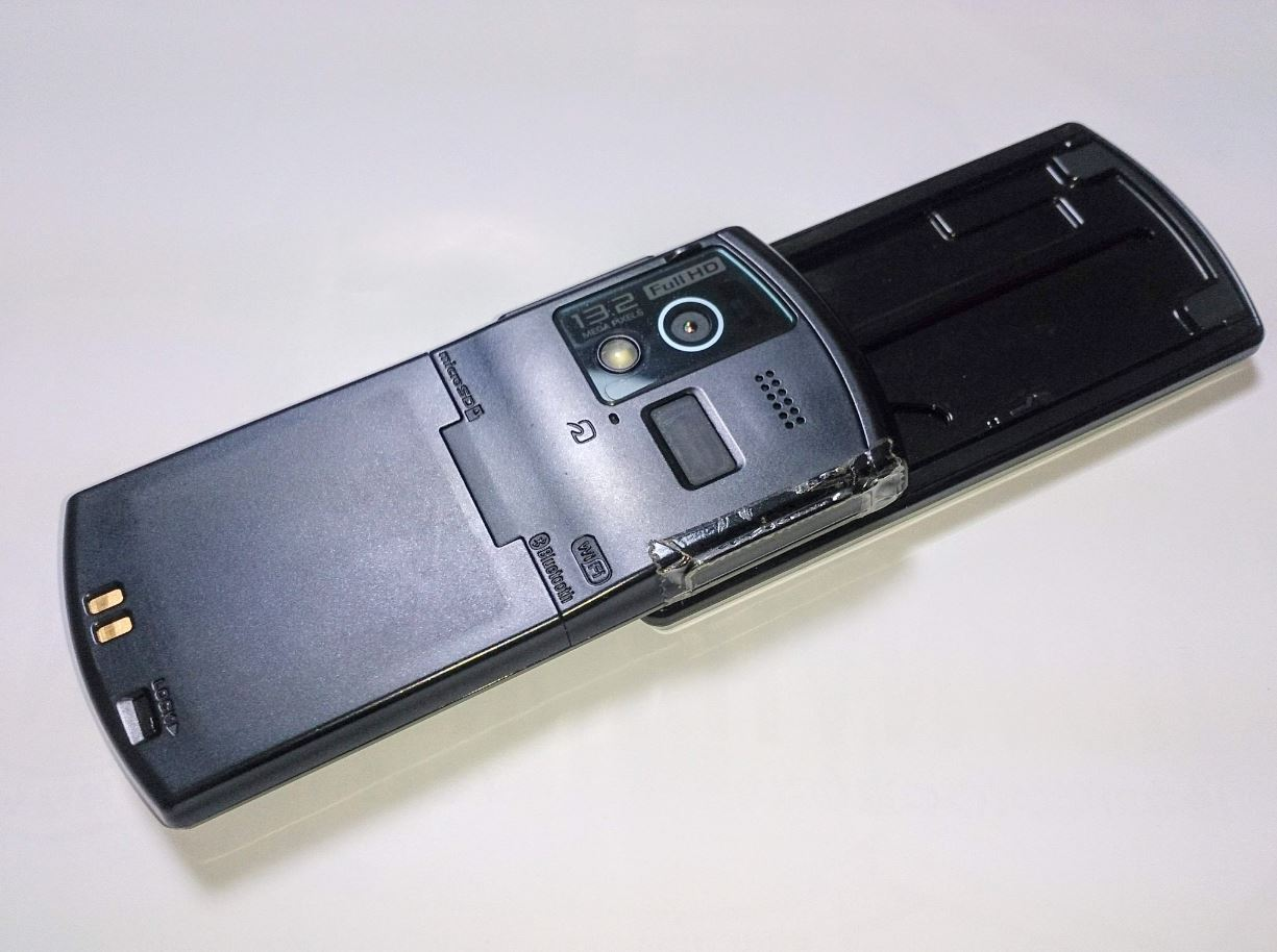 F-06Bの裏面